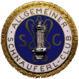 Das Logo des Allgemeinen Schnauferl-Club (ASC) stellte einen Ein-Zylinder De Dion-Bouton Motor dar, umgeben von den Buchstaben ASC.